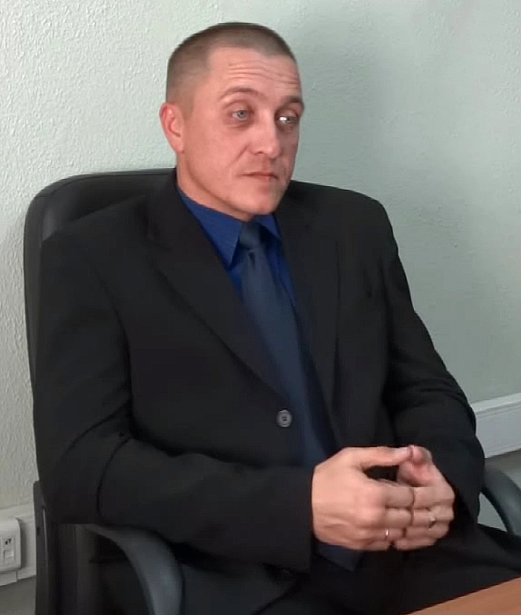 Видео icorpus.ru. Интервью с командиром ГБР Бэтмен А.А. Бедновым 27.10.2014